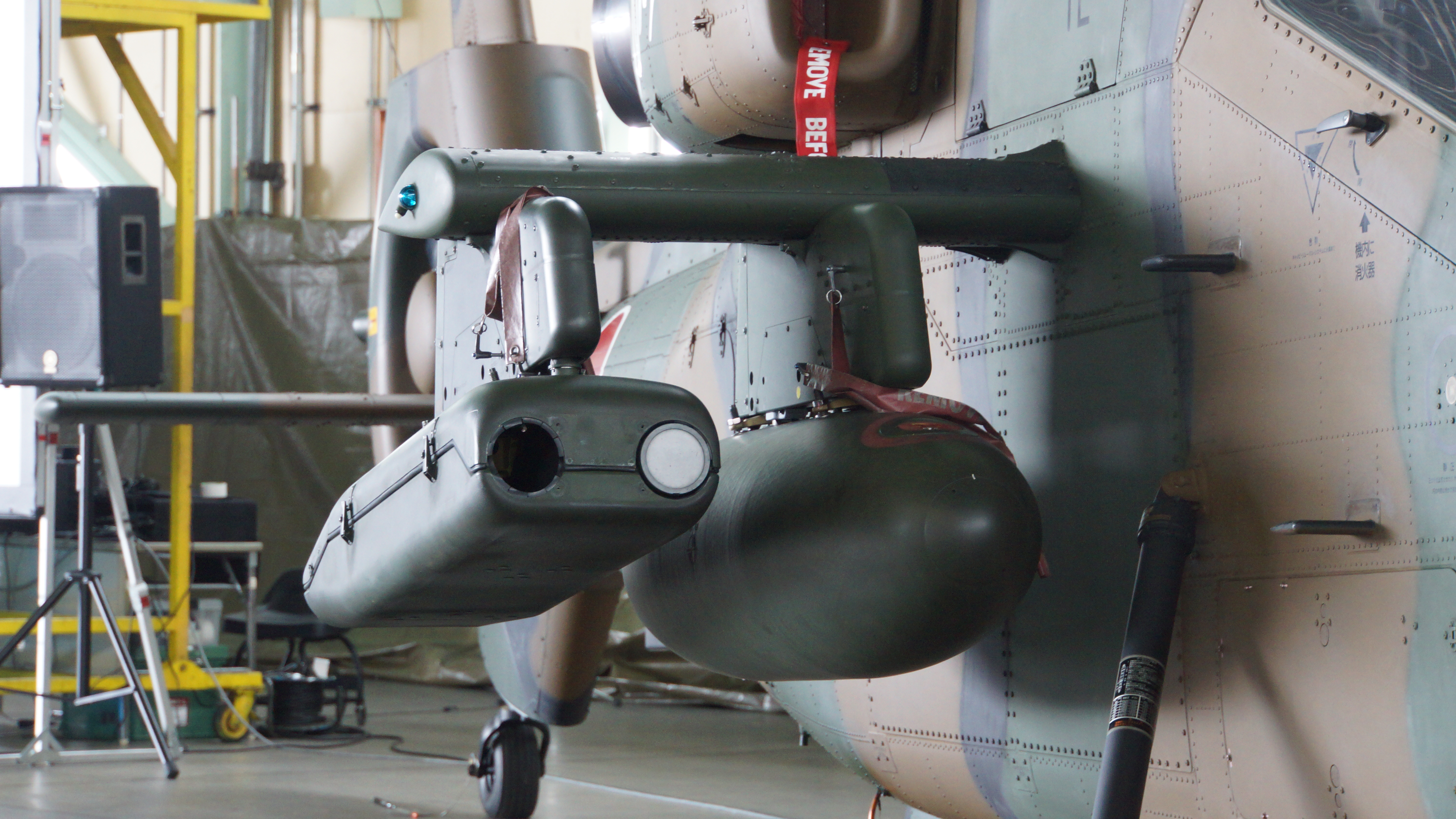 陸上自衛隊 OH-1観測ヘリコプター（32603号機） 右側スタブウィング及び91式地対空誘導弾（SAM-2）発射機。2016年10月2日 明野駐屯地にて。